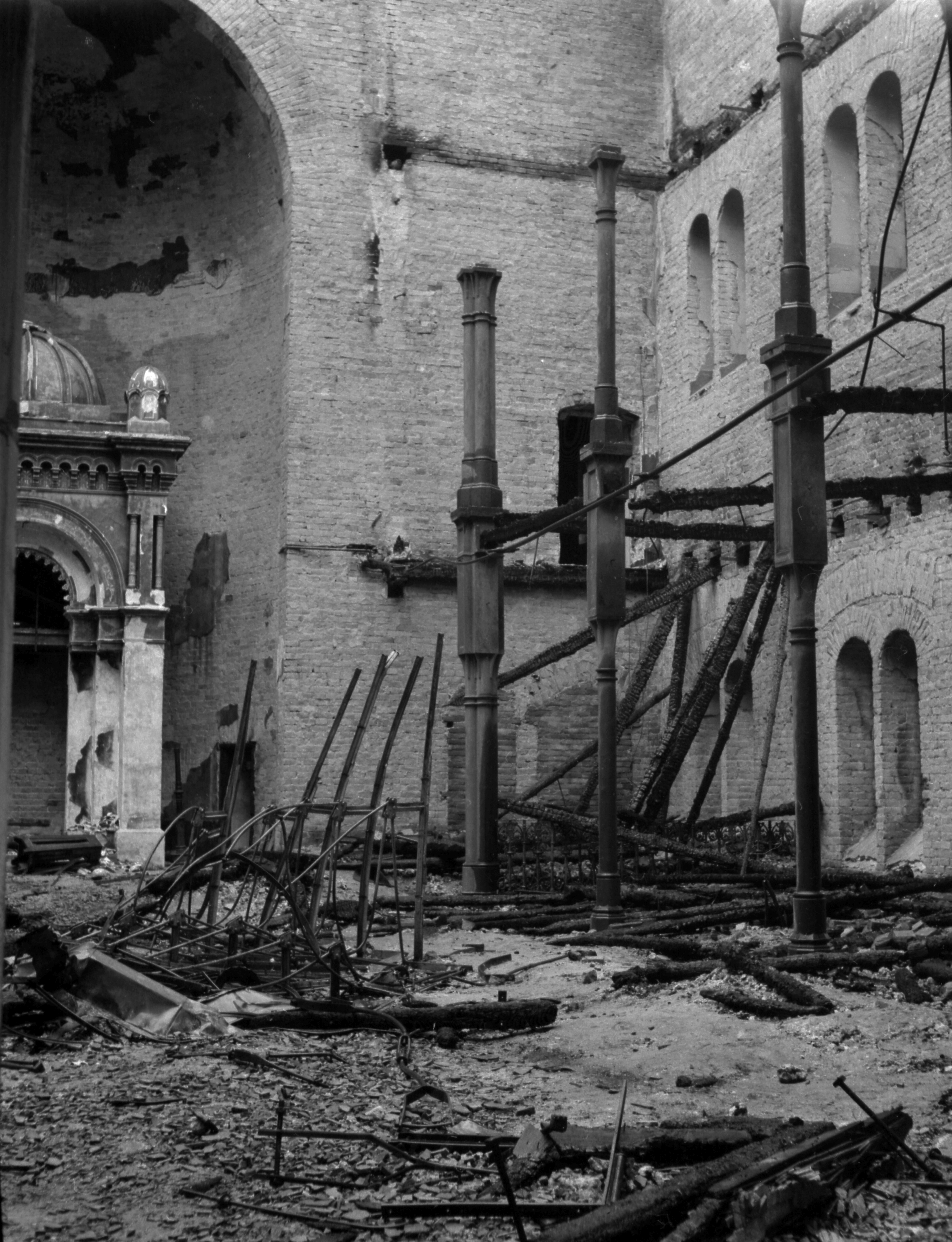 a zsinagóga romjai. Location: Croatia, Osijek Tags: war damage, synagogue Title: a zsinagóga romjai.